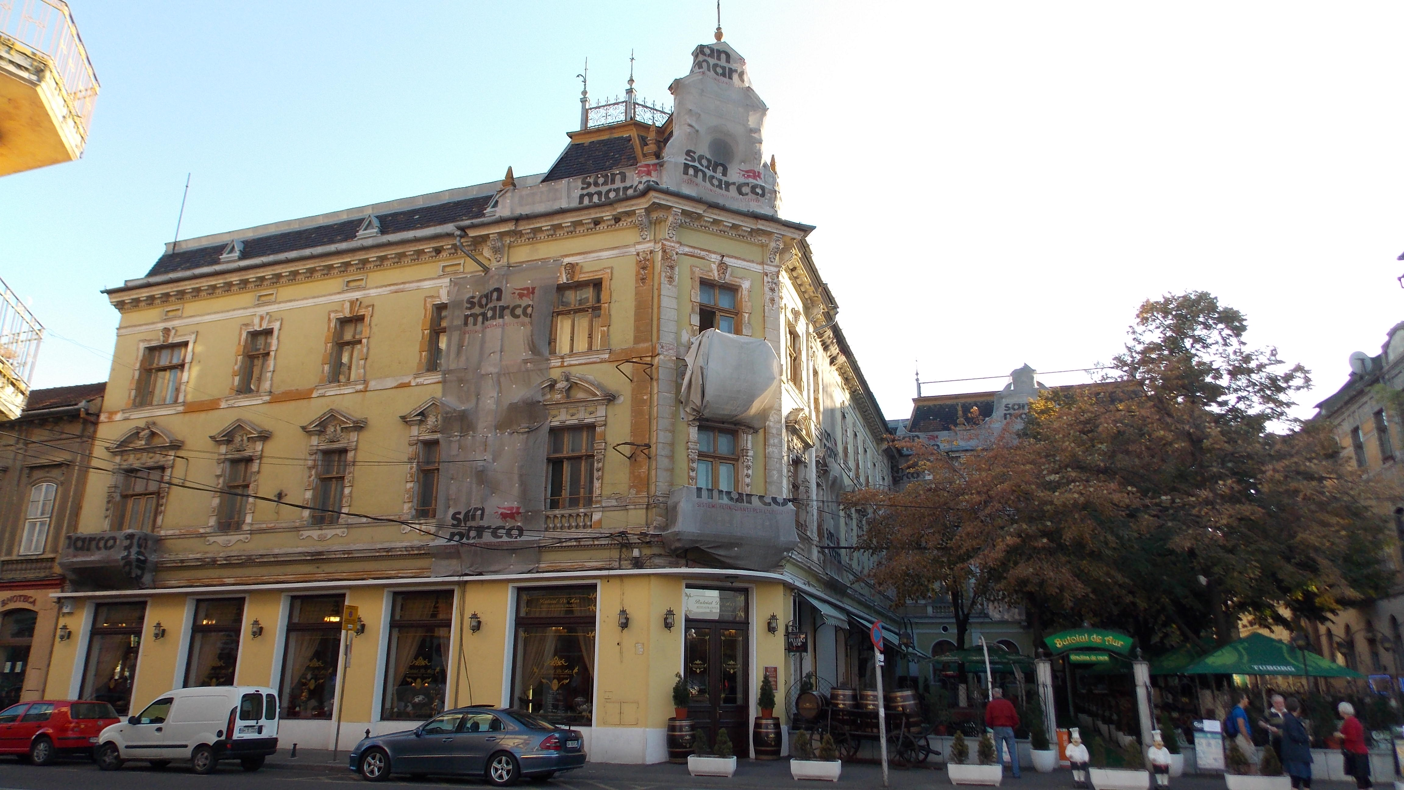 Fost Hotel și Băi Rimanoczyși fosta cafenea Royal